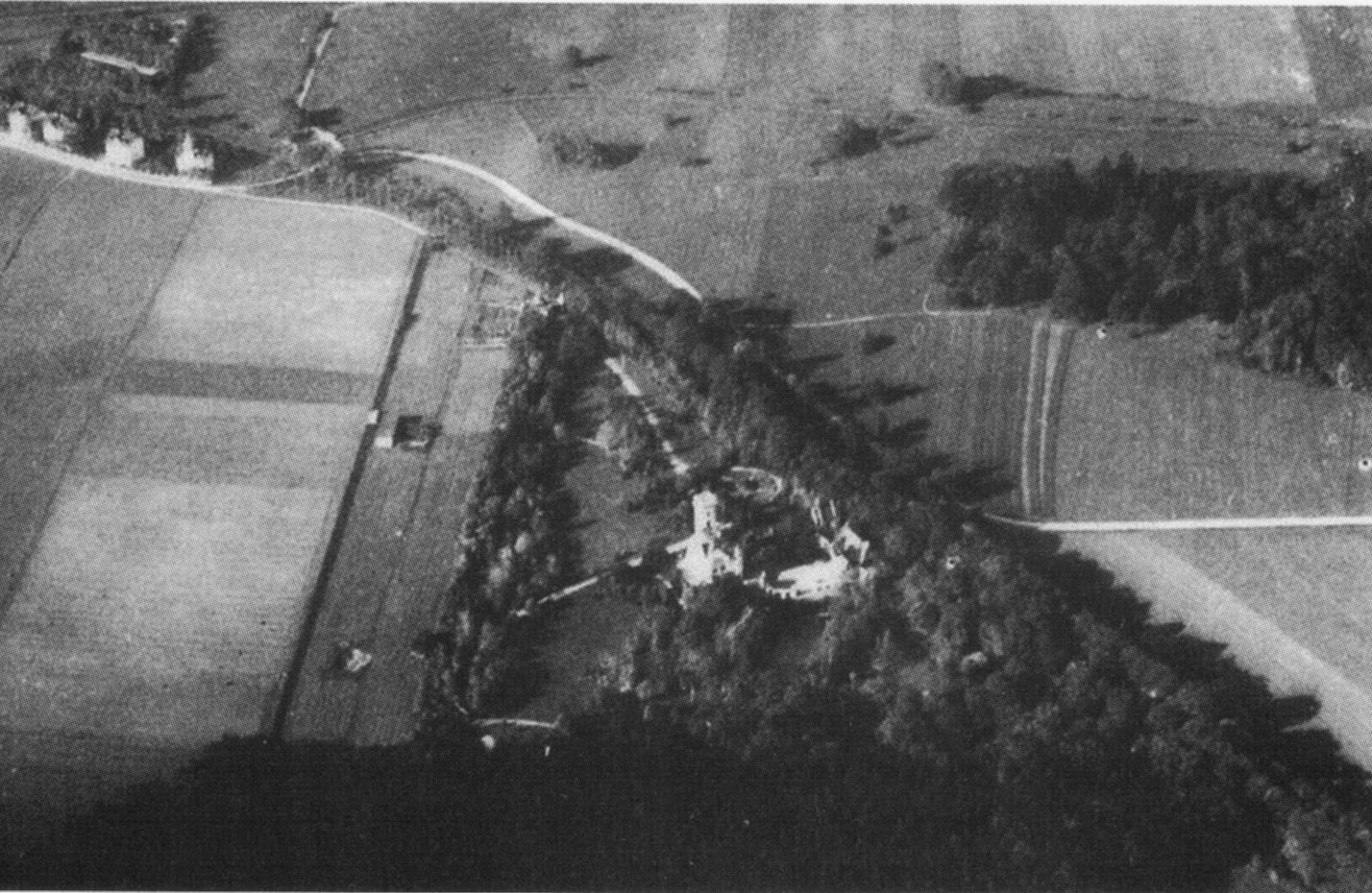 Gelände von Schloss Allach; Luftaufnahme von 1912, von Osten